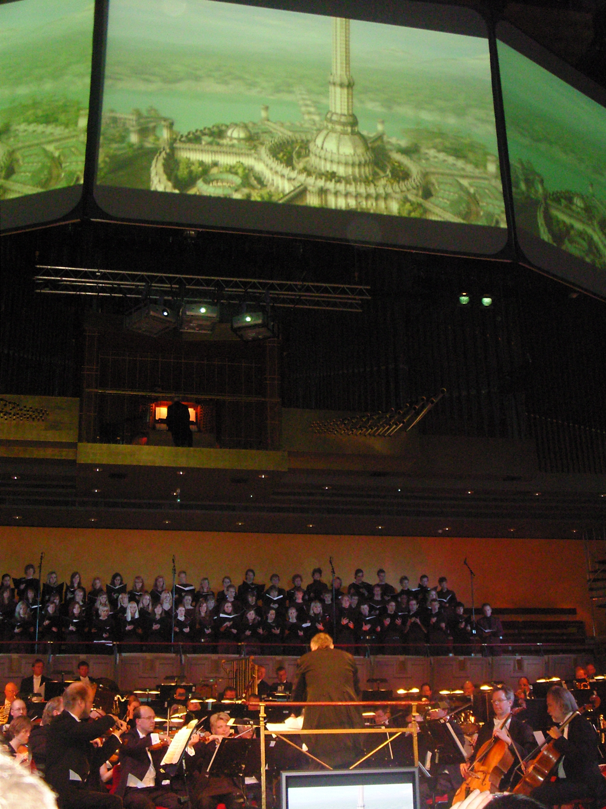 Oblivion